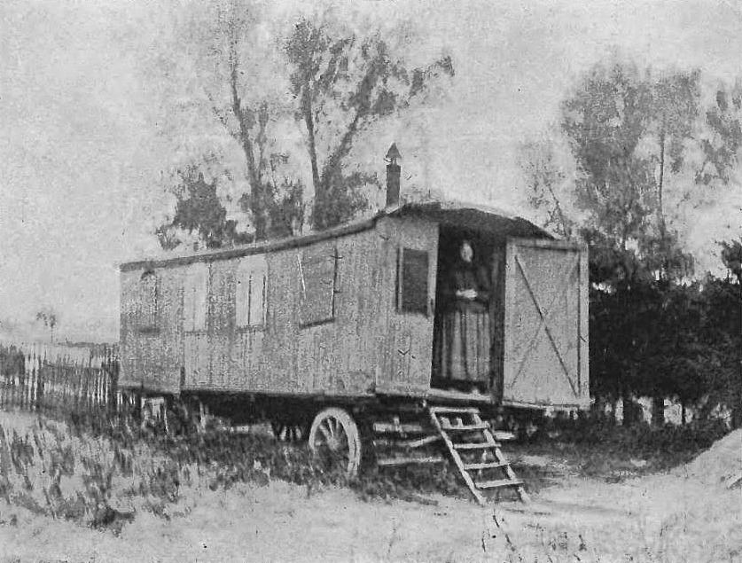 Wóz Drzymały w Rakowienicach (-1907)